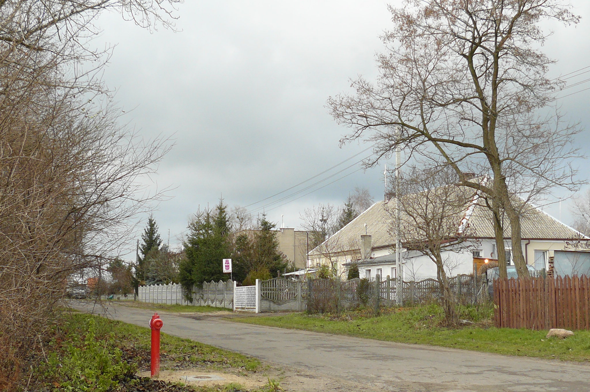 Rostworowo koło Poznania.